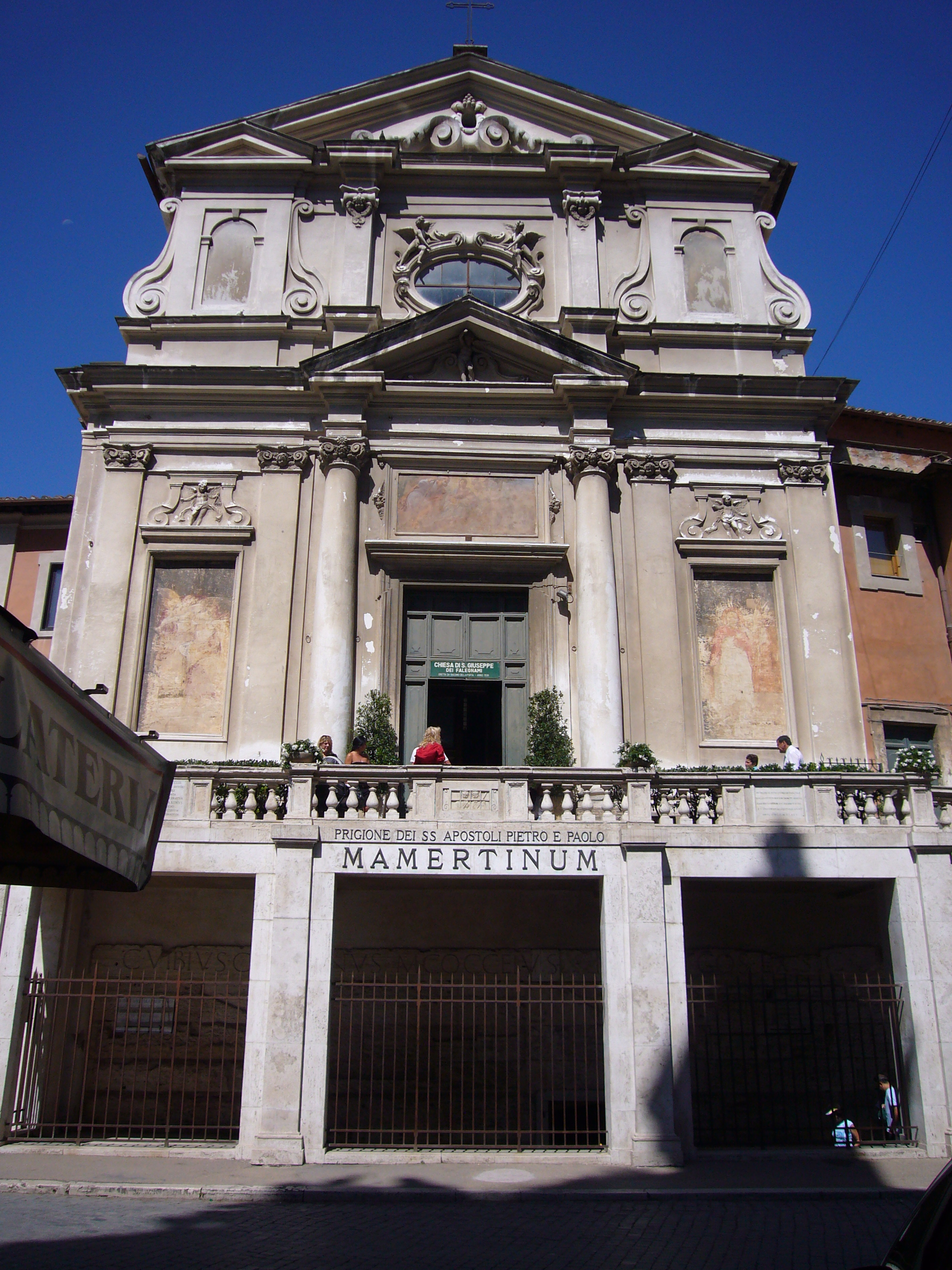 Roma, chiesa di S. Giuseppe dei Falegnami e Mamertinum